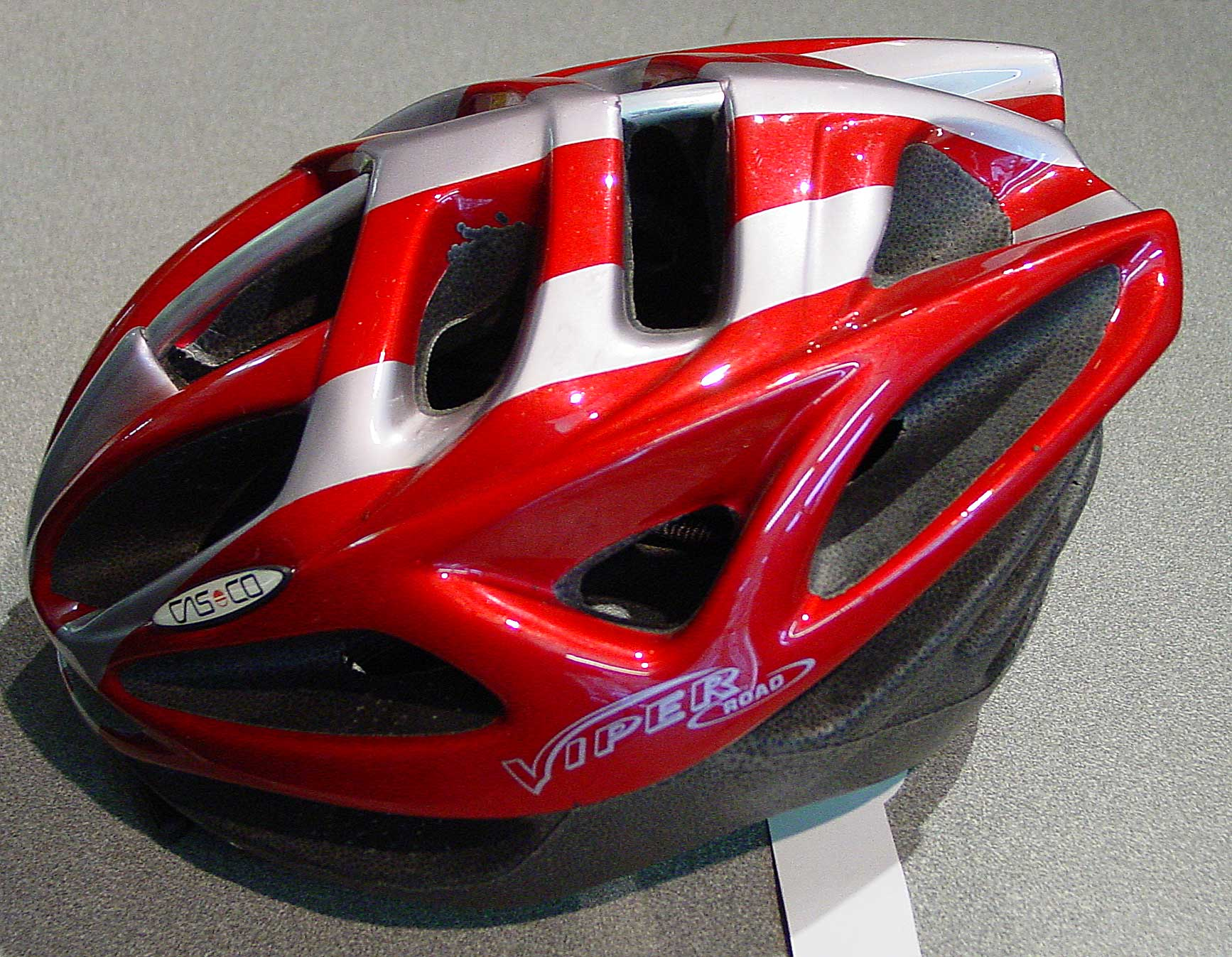 Fahrradhelm